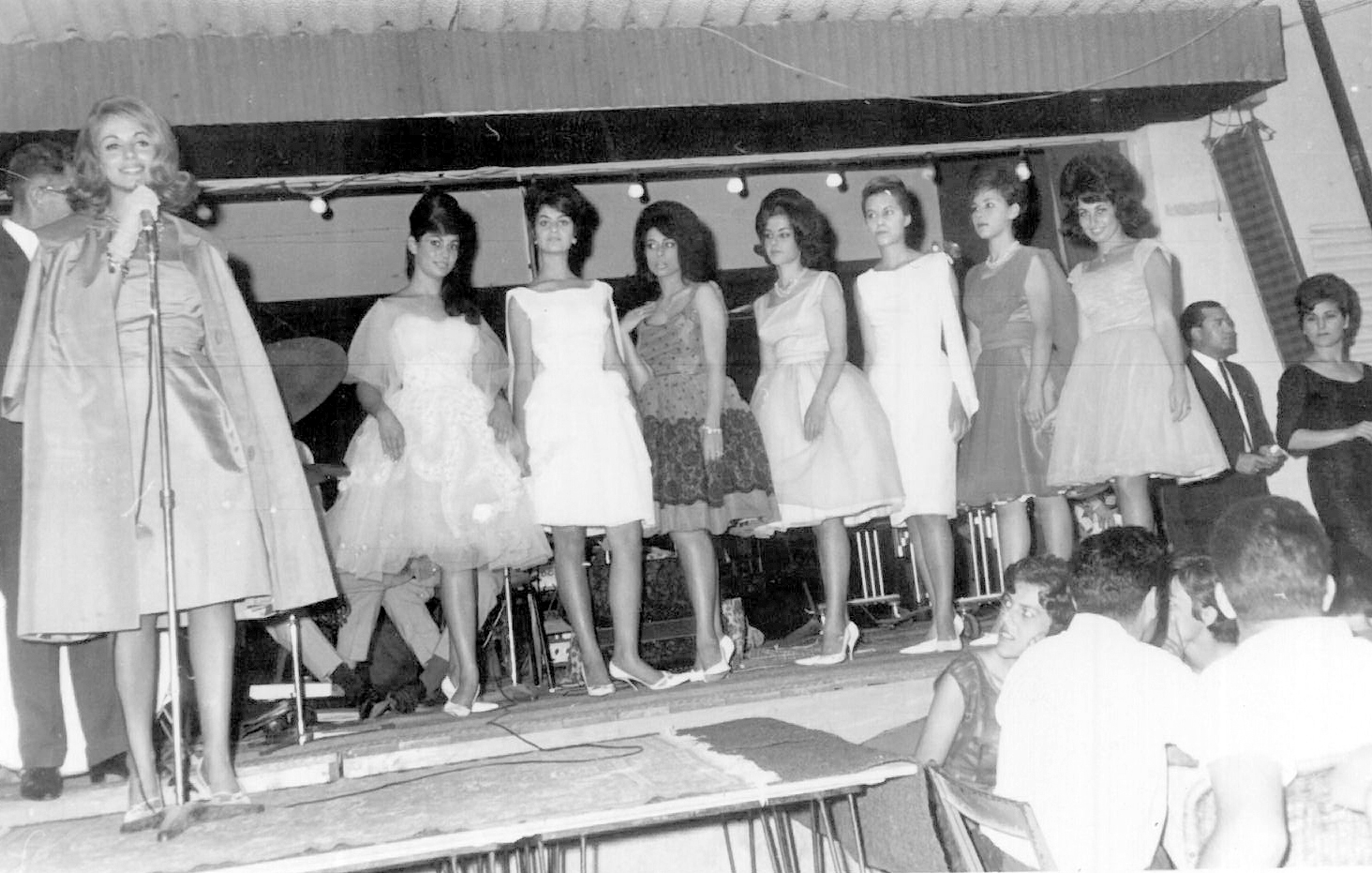 תצוגת אופנה במסעדה, שנות ה-60 המאוחרות